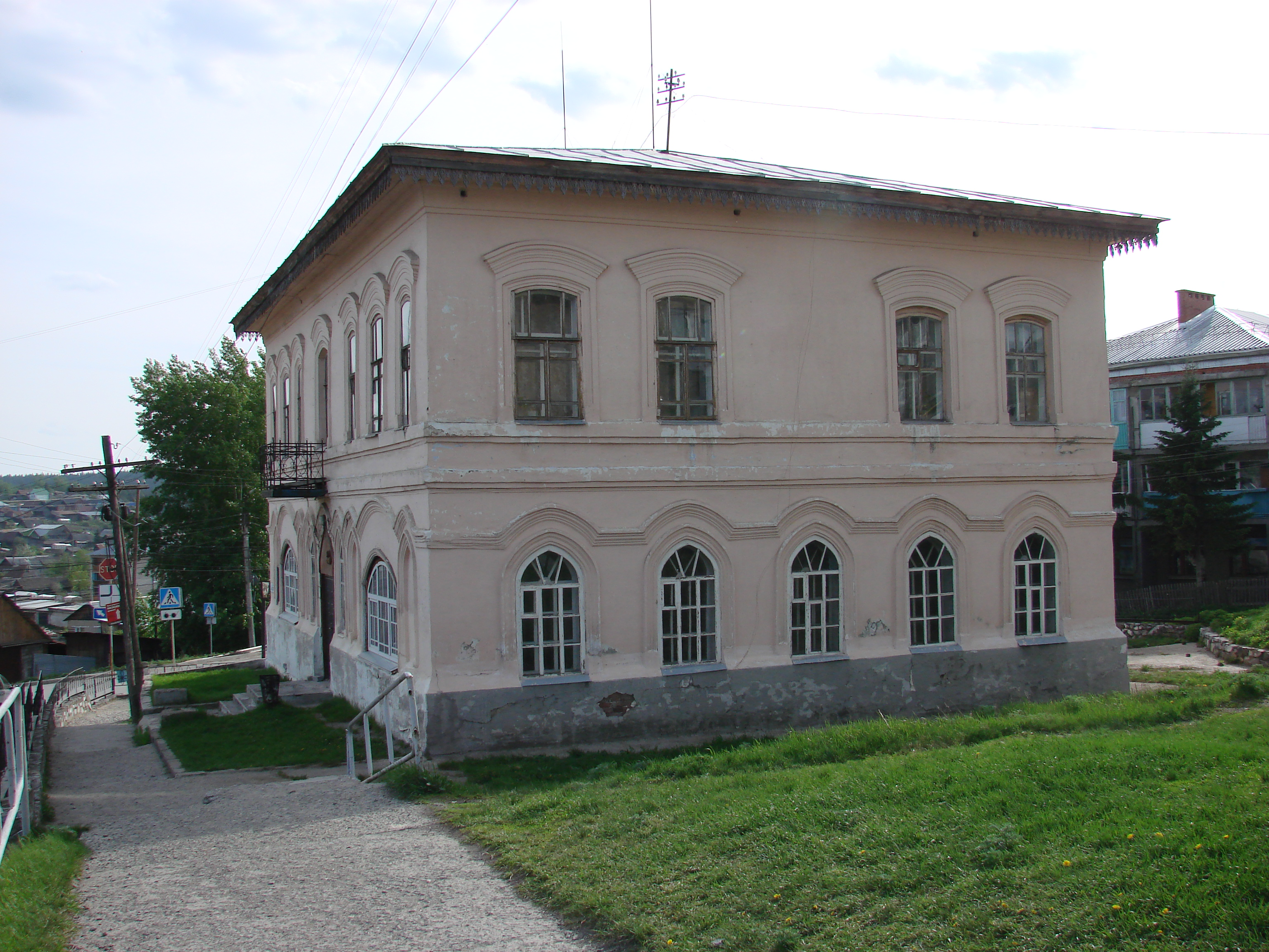 Нязепетровск, ул. Свердлова, 21, Музейно-выставочный центр г. Нязепетровска